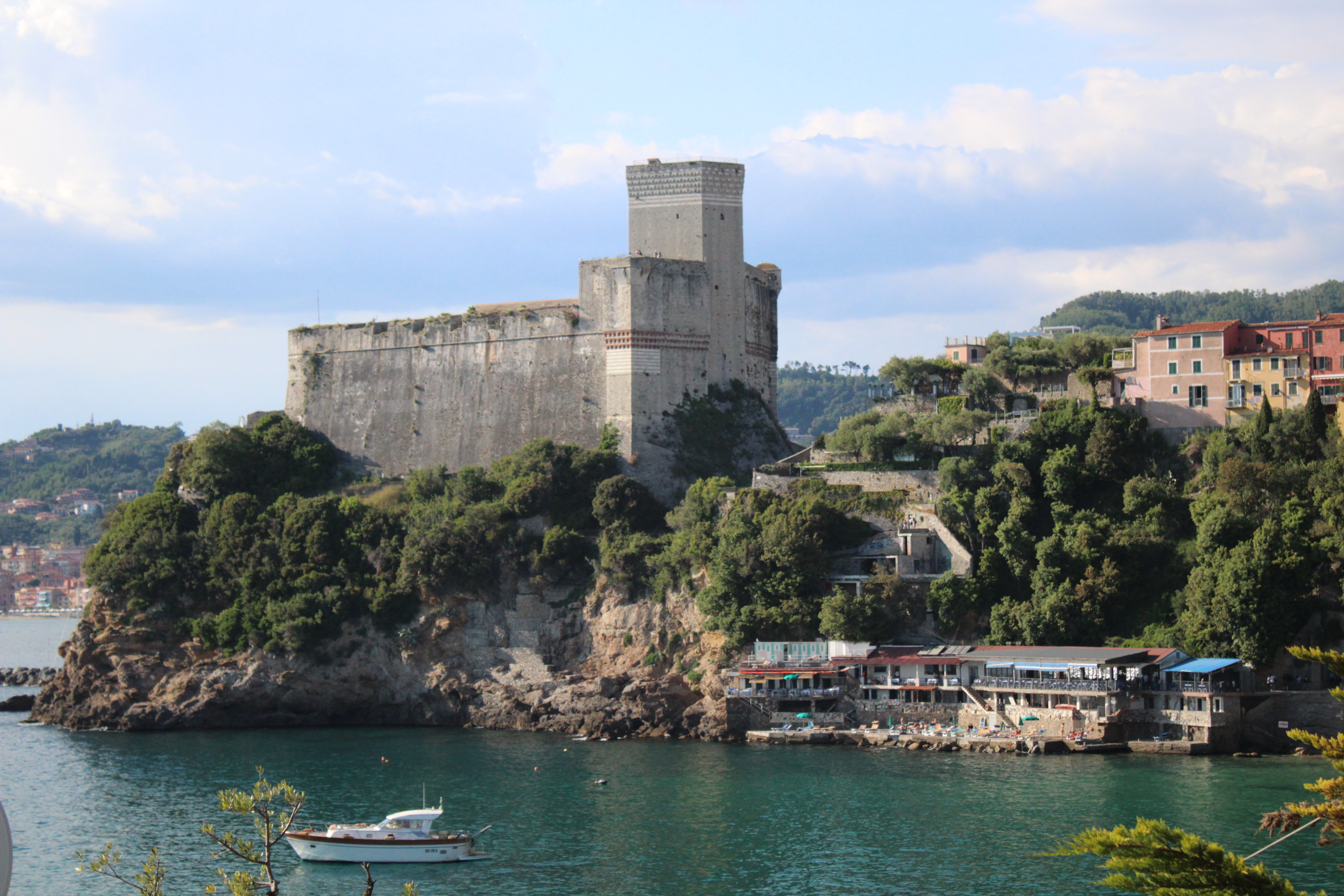 Castello di Lerici This is a photo of a monument which is part of cultural heritage of Italy.